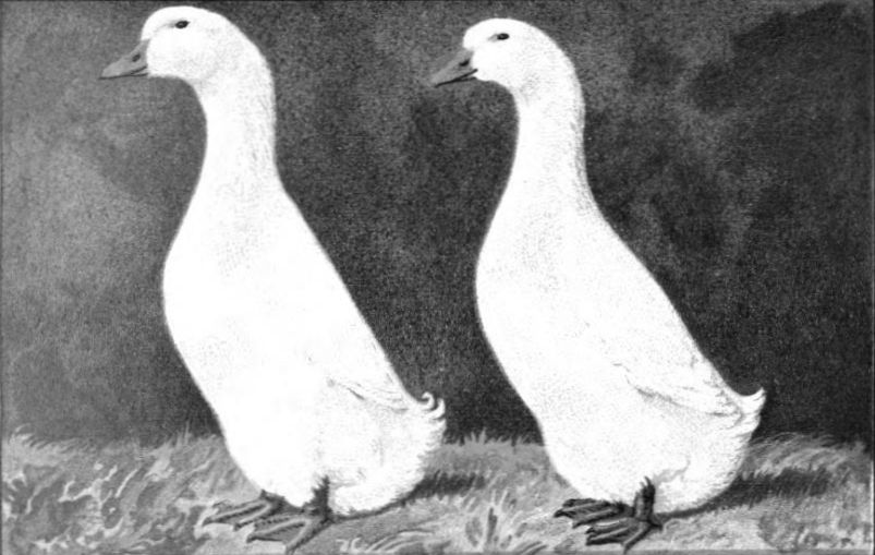 Abbildung der (Deutschen) Pekingente aus Kramers Taschenbuch des Rassegeflügels.